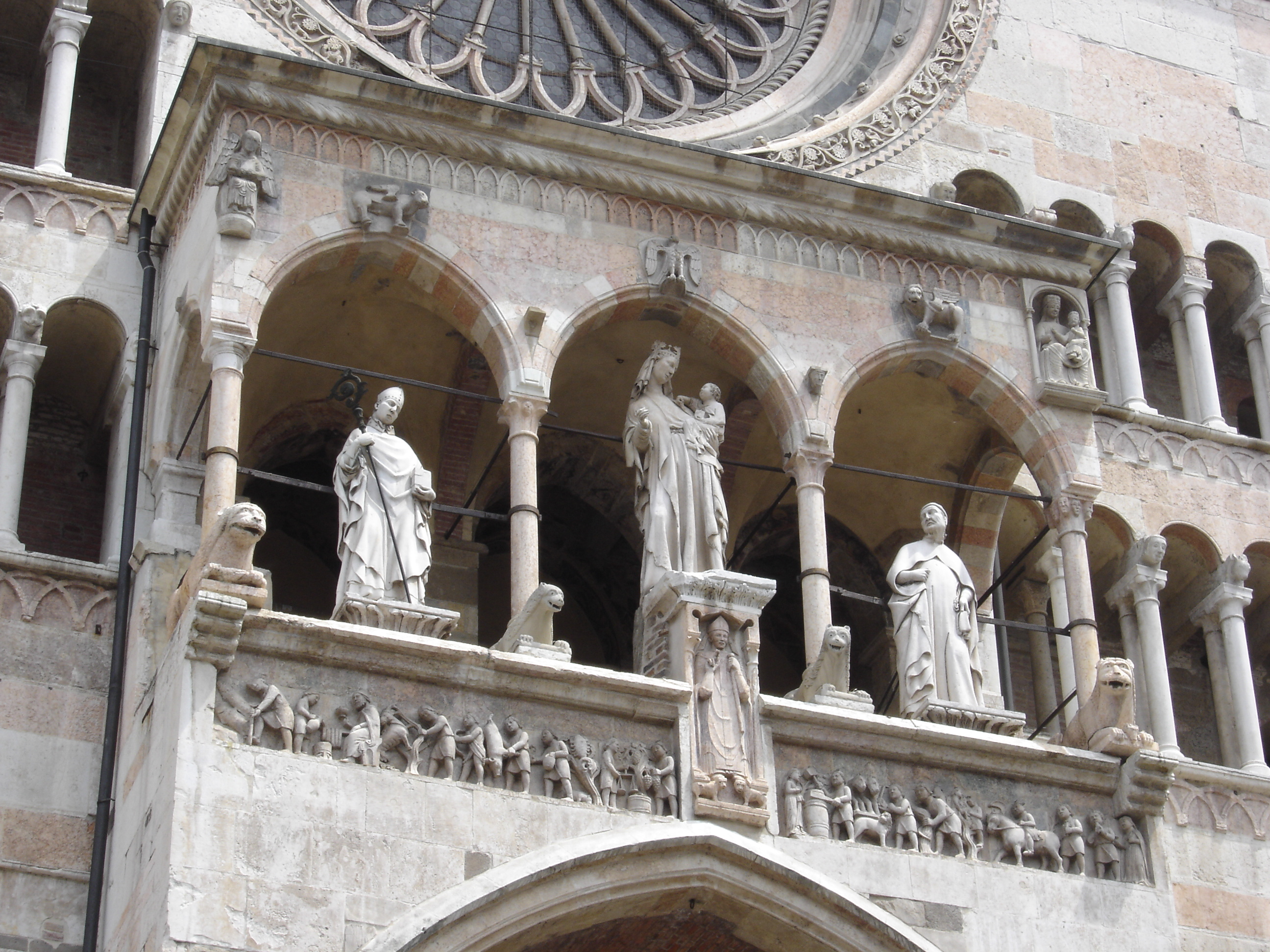 Cremona-dome-facade-statues